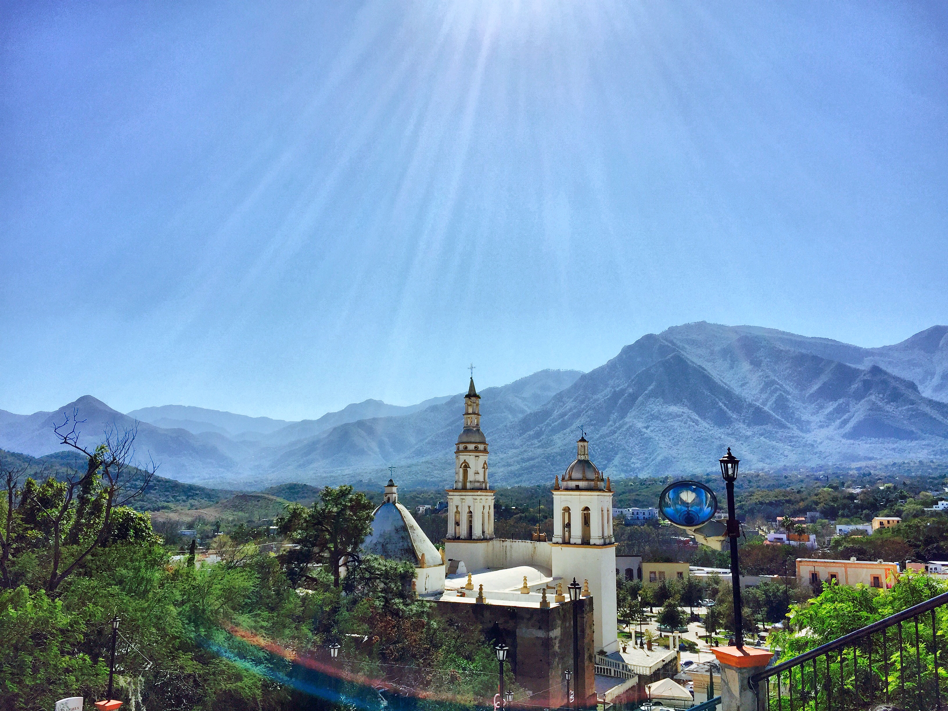 Villa de Santiago